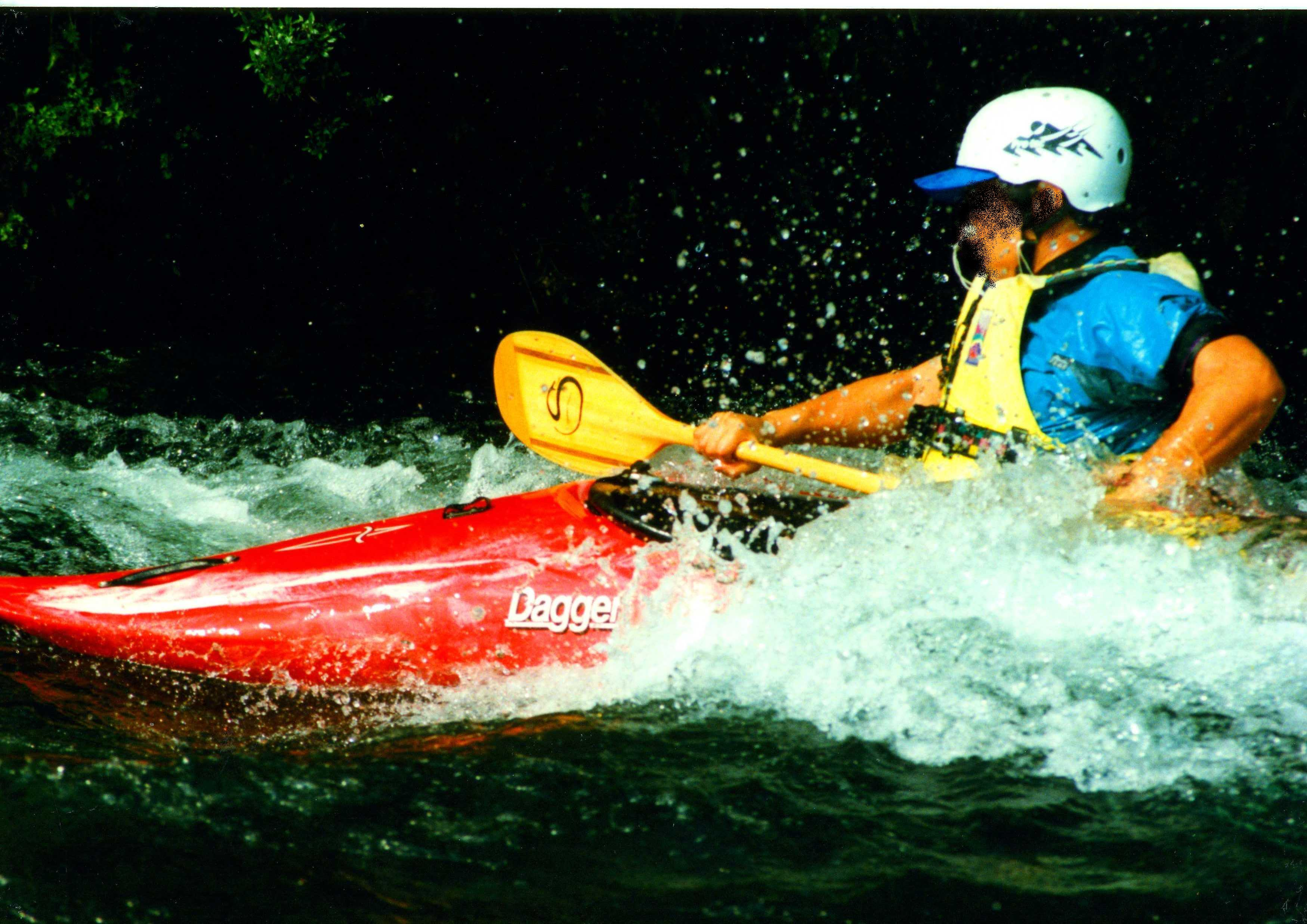 リバーカヤック リジッドタイプカヤック